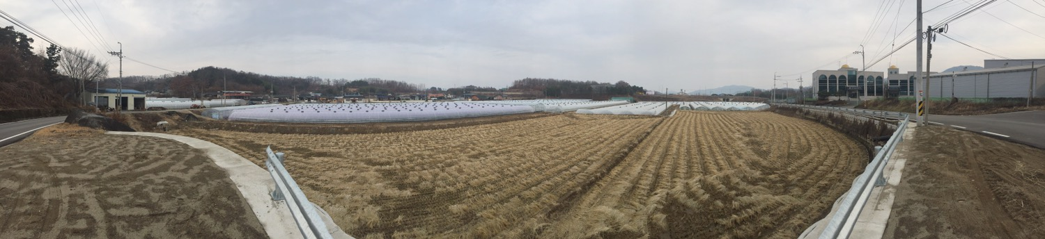 대한민국 경상북도 성주군 대가면 옥성2리 파노라마 전경